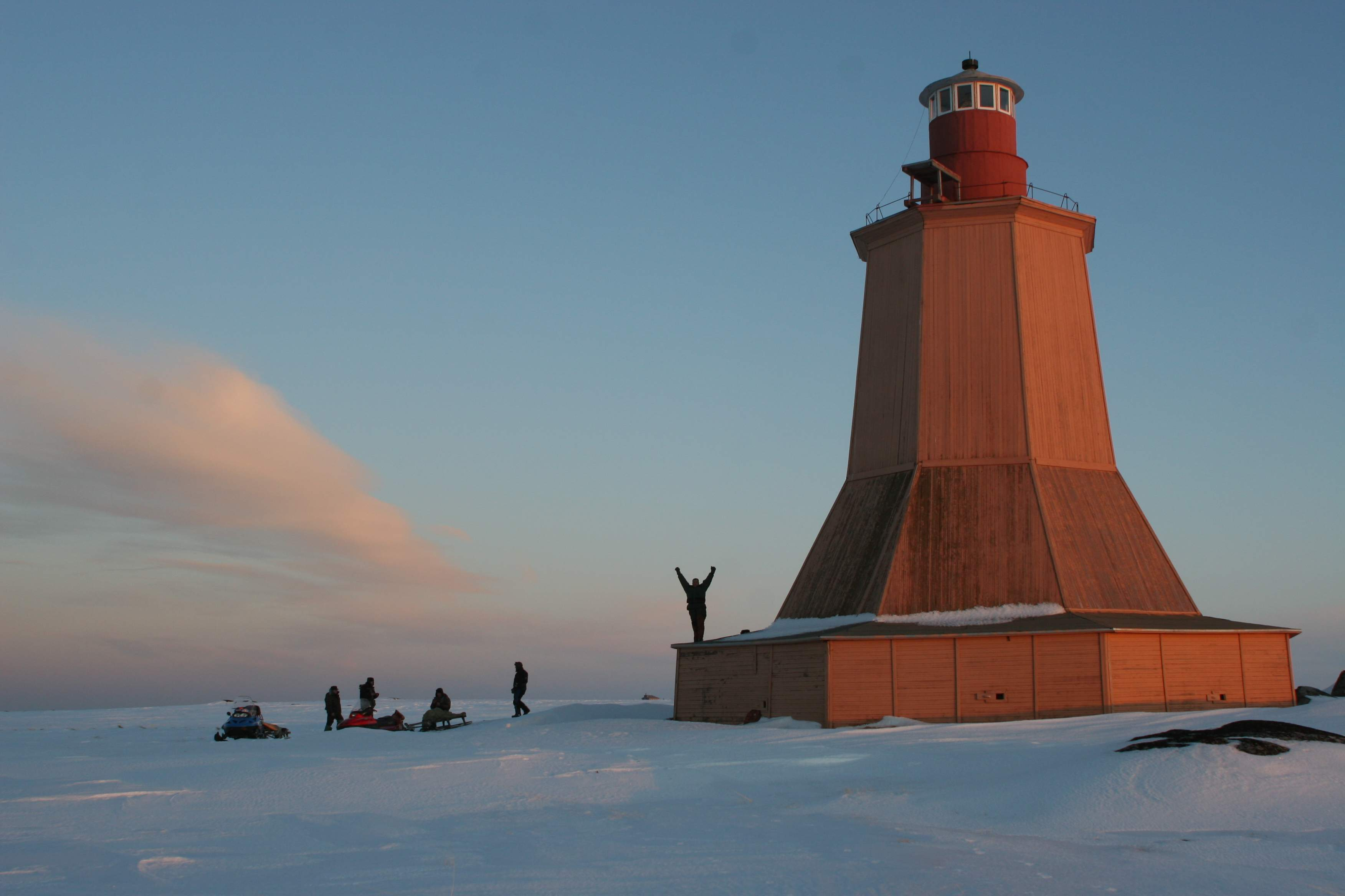 Святоносский маяк